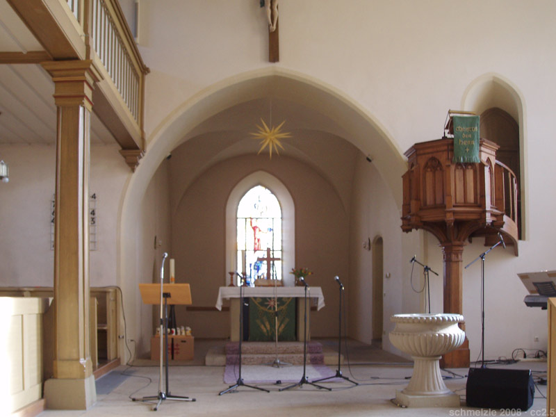 Ev. Kirche in Heilbronn-Biberach